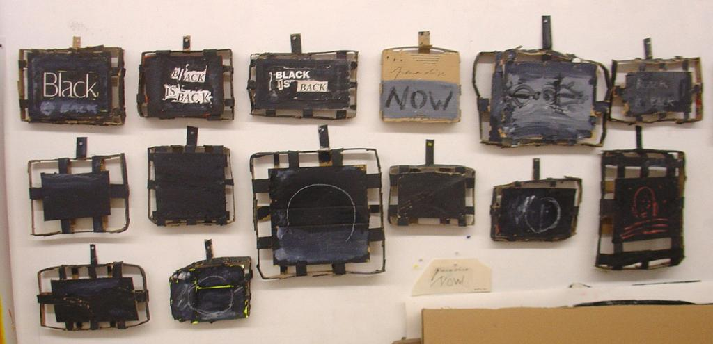 peinture